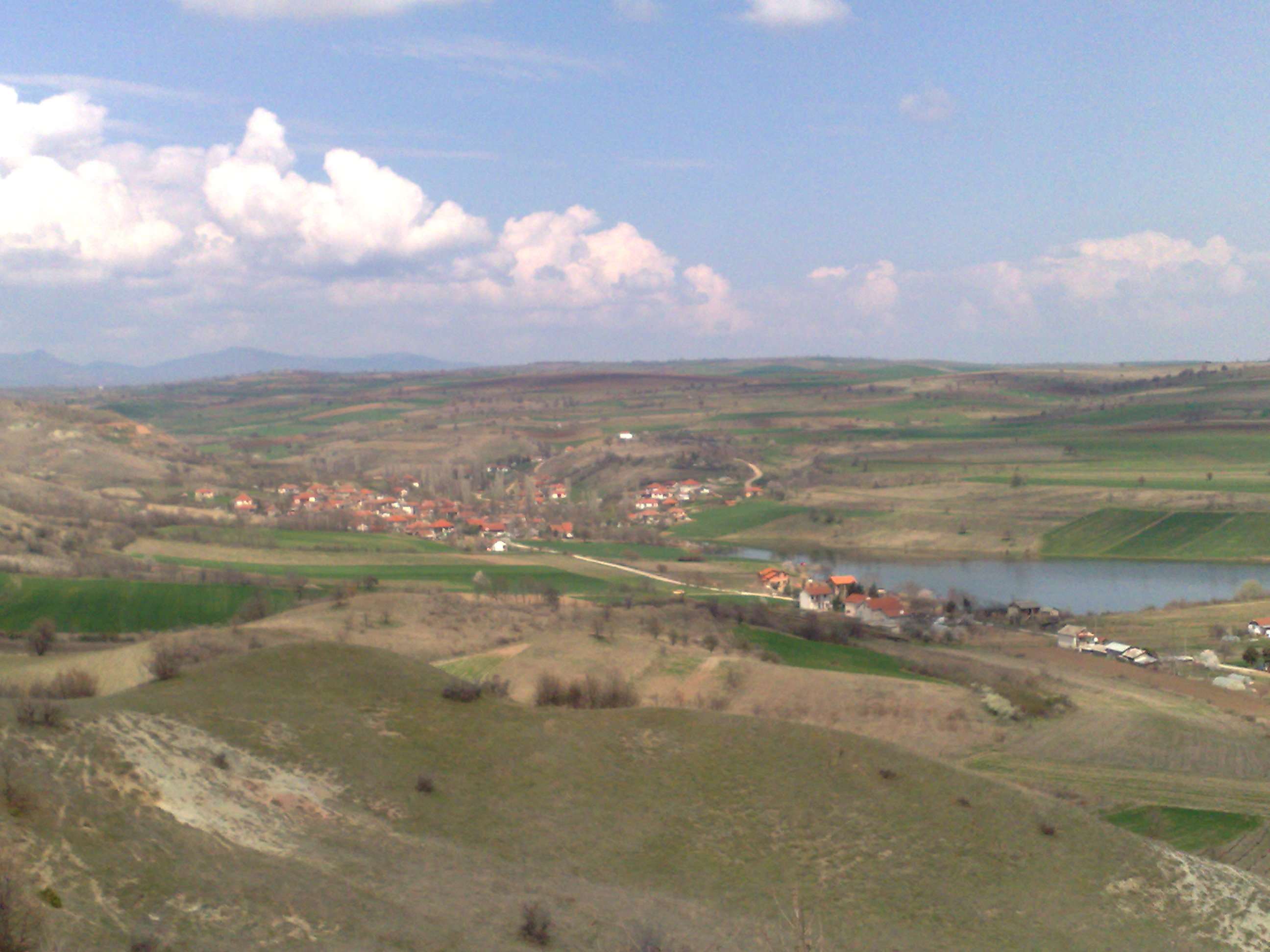 Поглед на Бучинци и малото езерце